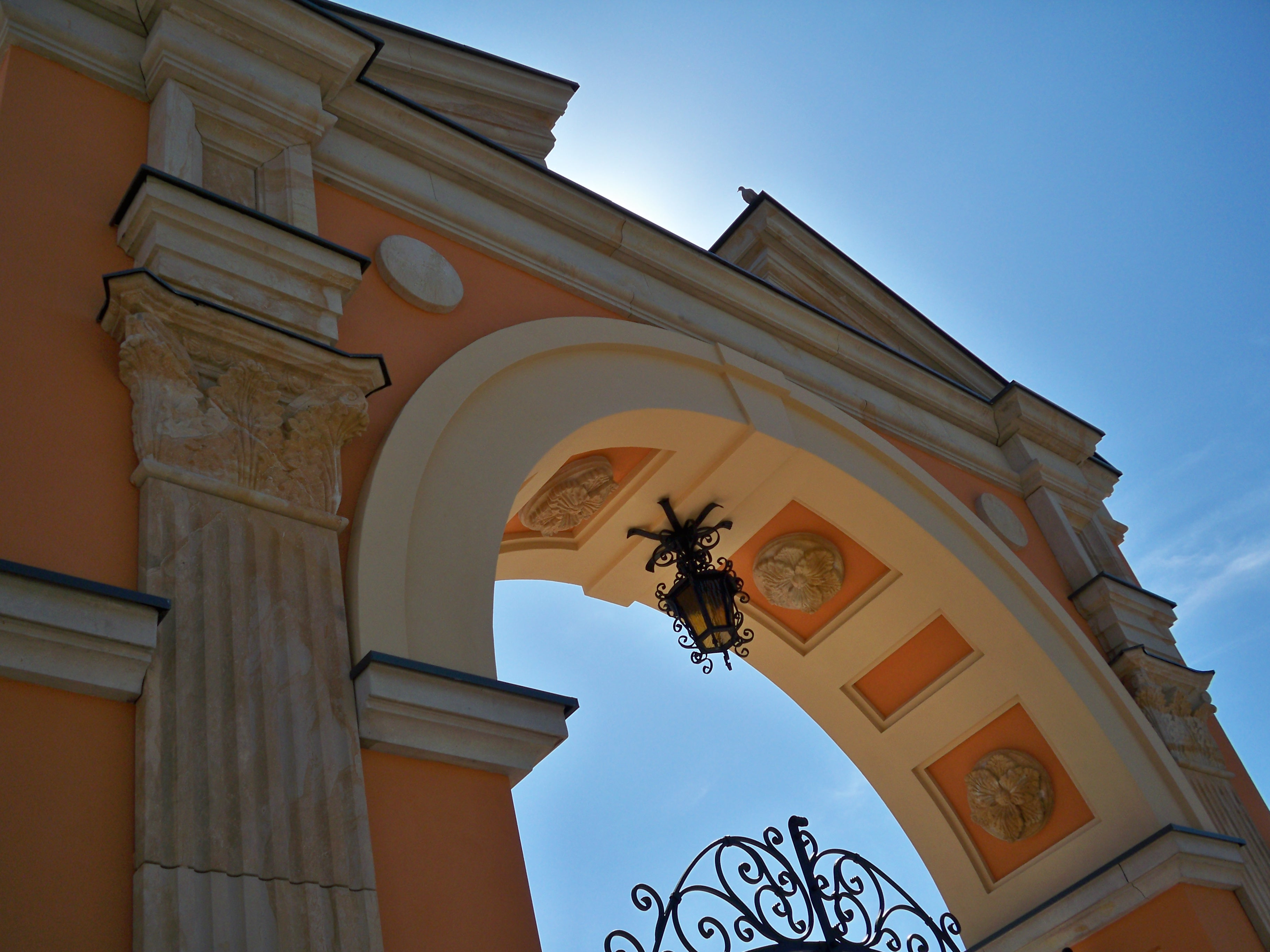 Pałac Bursztynowy (2009 r.)